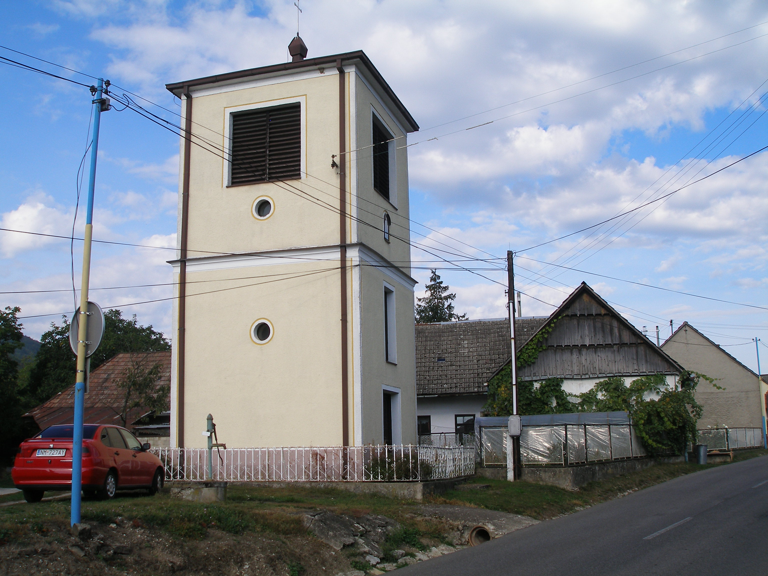 Věž v Zemianskem Podhradie.